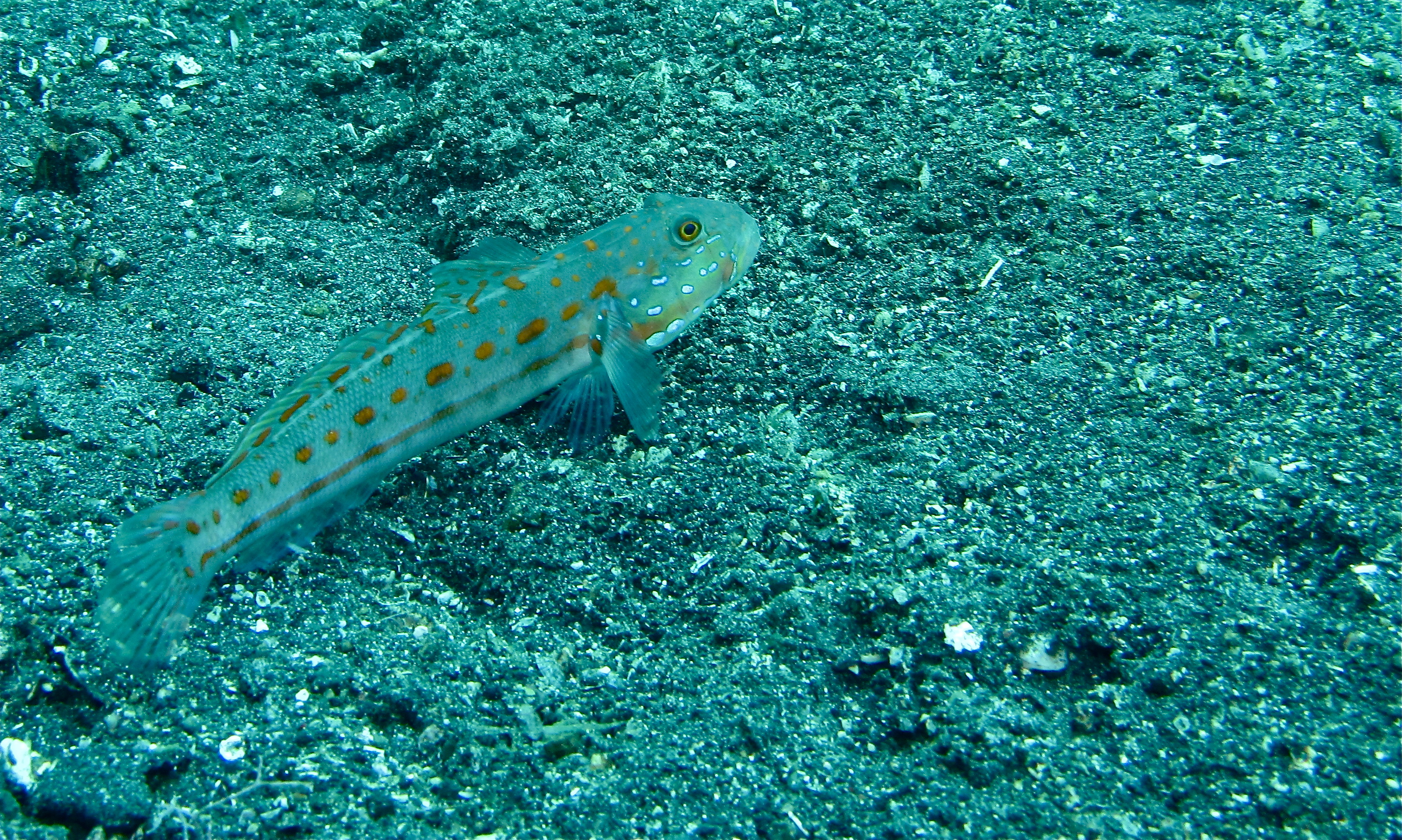 Makawide, Lembeh Strait, Sulawesi, INDONESIA